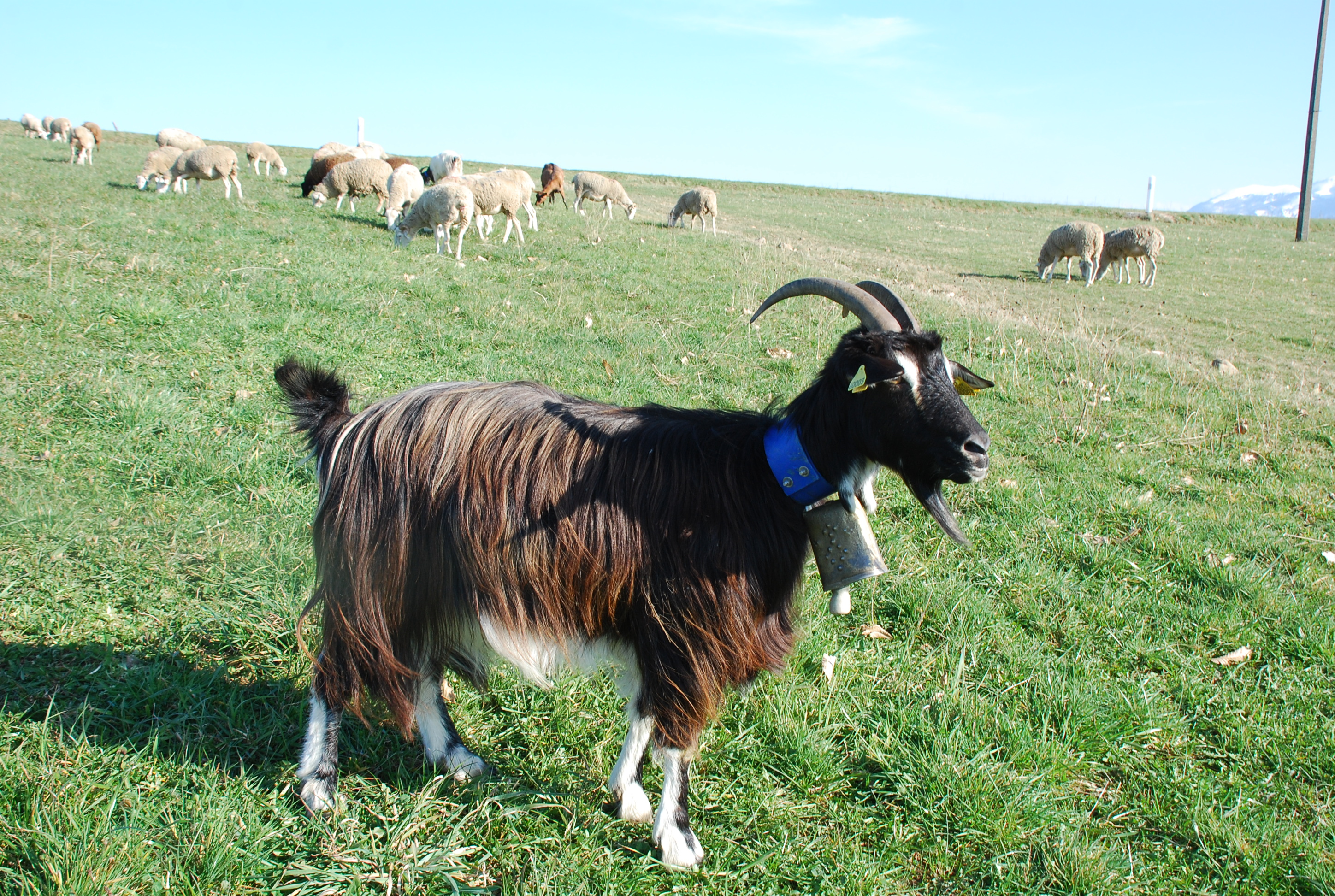 Chèvre des Pyrénées dans un troupeau de brebis Tarasconnaises, près de Cieutat au dessus de Bagnères de Bigorre (Hautes-Pyrénées)